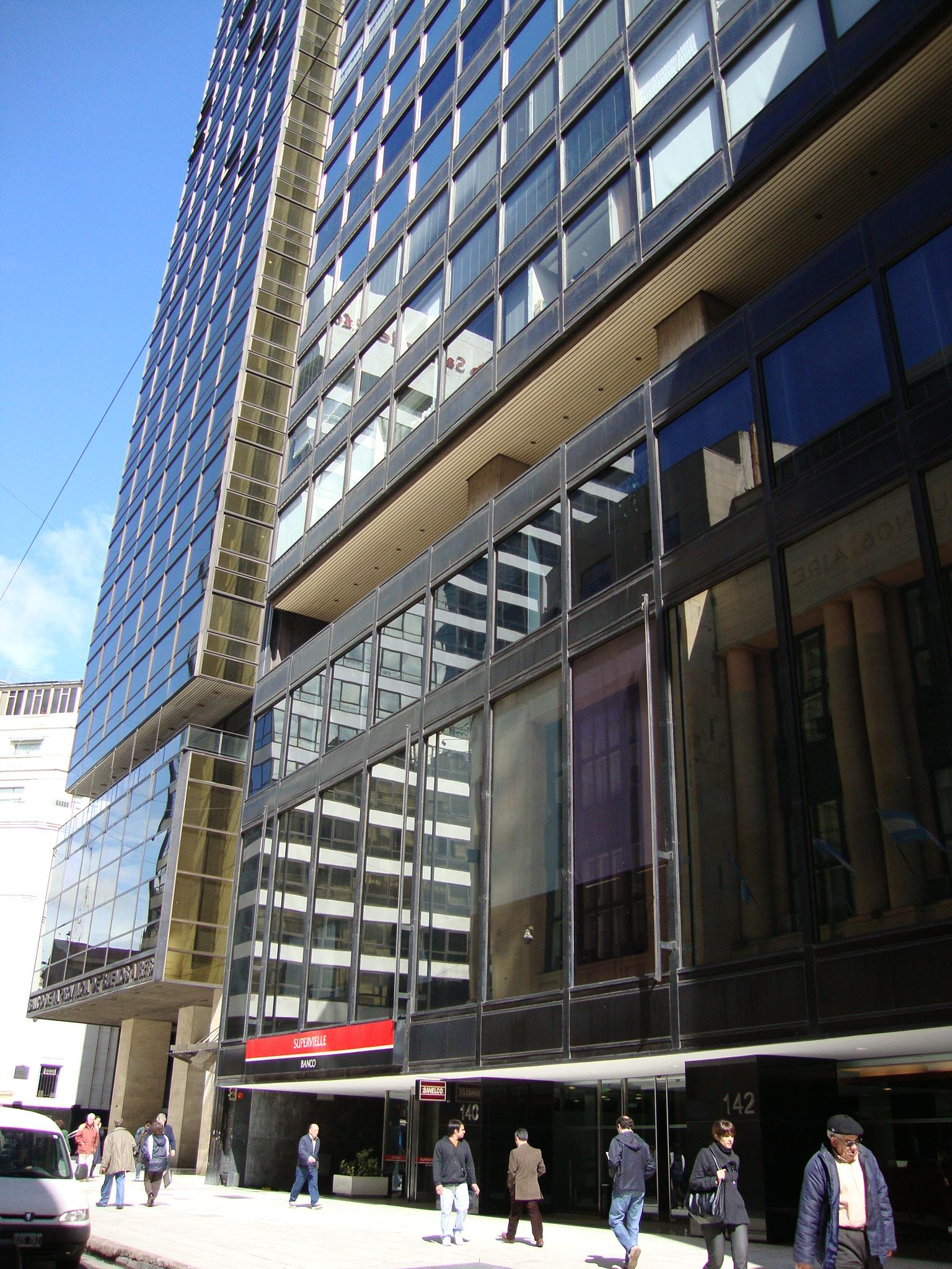 Vista de la base del edificio San Martín 128 (Banco Supervielle), junto a la Torre del Banco de la Provincia de Buenos Aires. Barrio de San Nicolás, ciudad de Buenos Aires, Argentina.